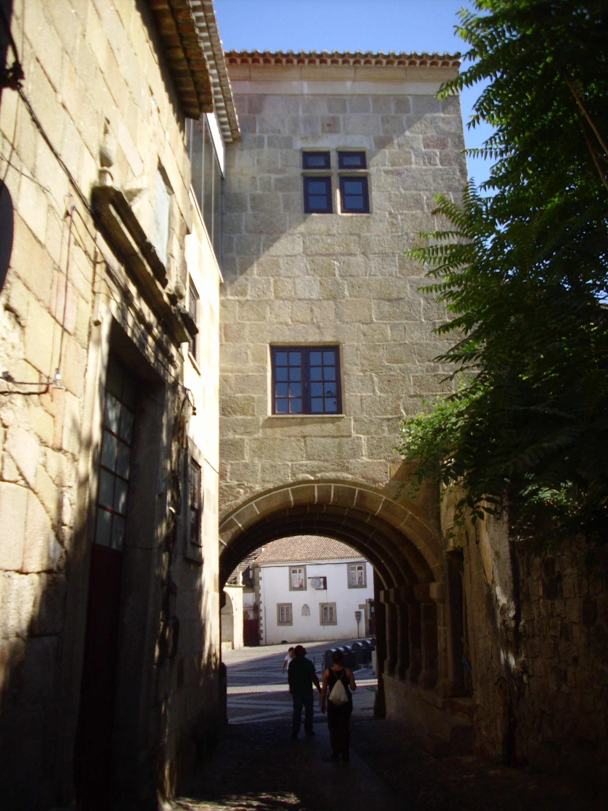 Castelo Branco This monument is classified as Imóvel de Interesse Público. This file was uploaded for Wiki Loves Monuments in Portugal with the unique identifier 72199.